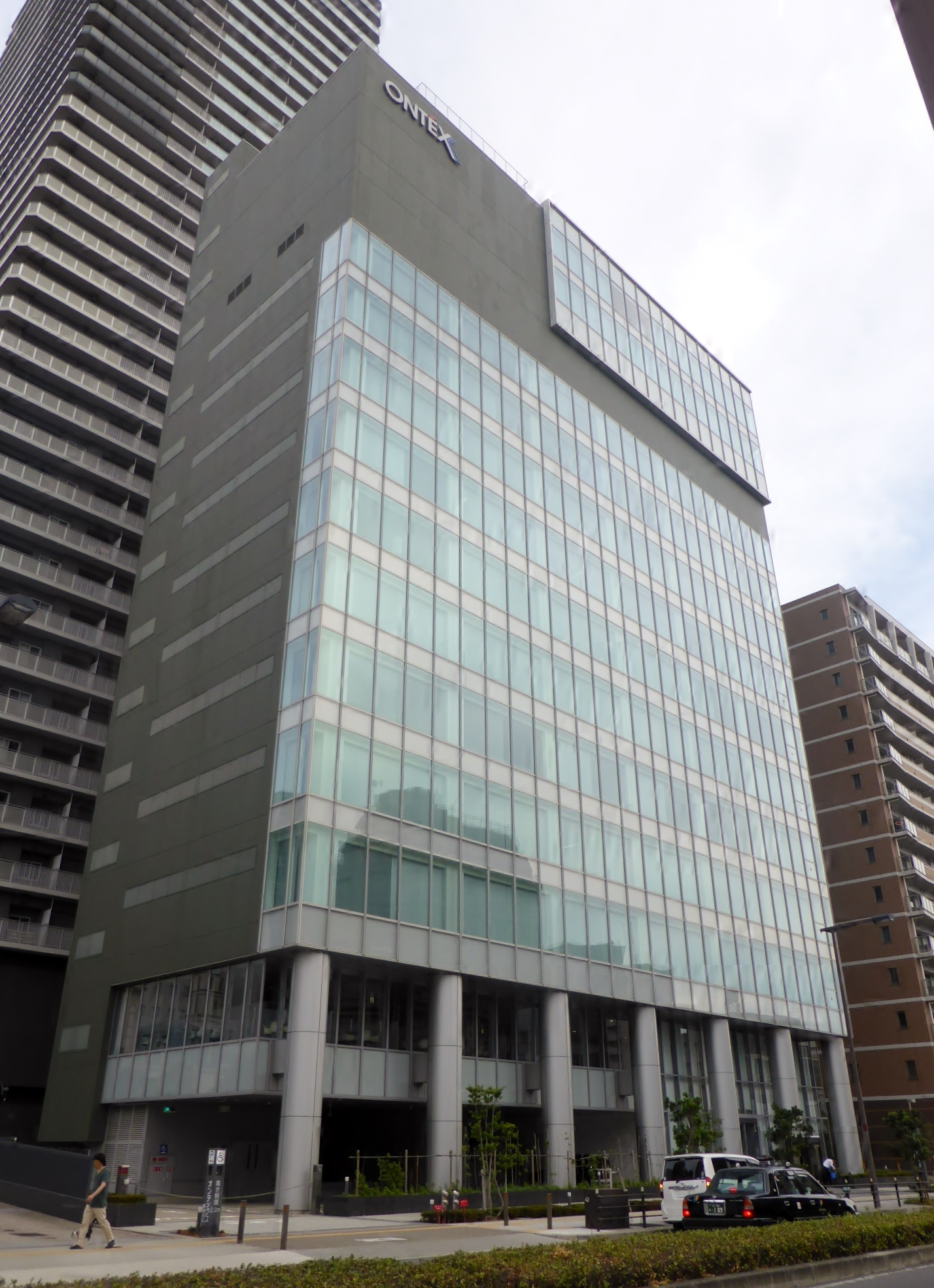 オンテックス難波ビルを撮影。